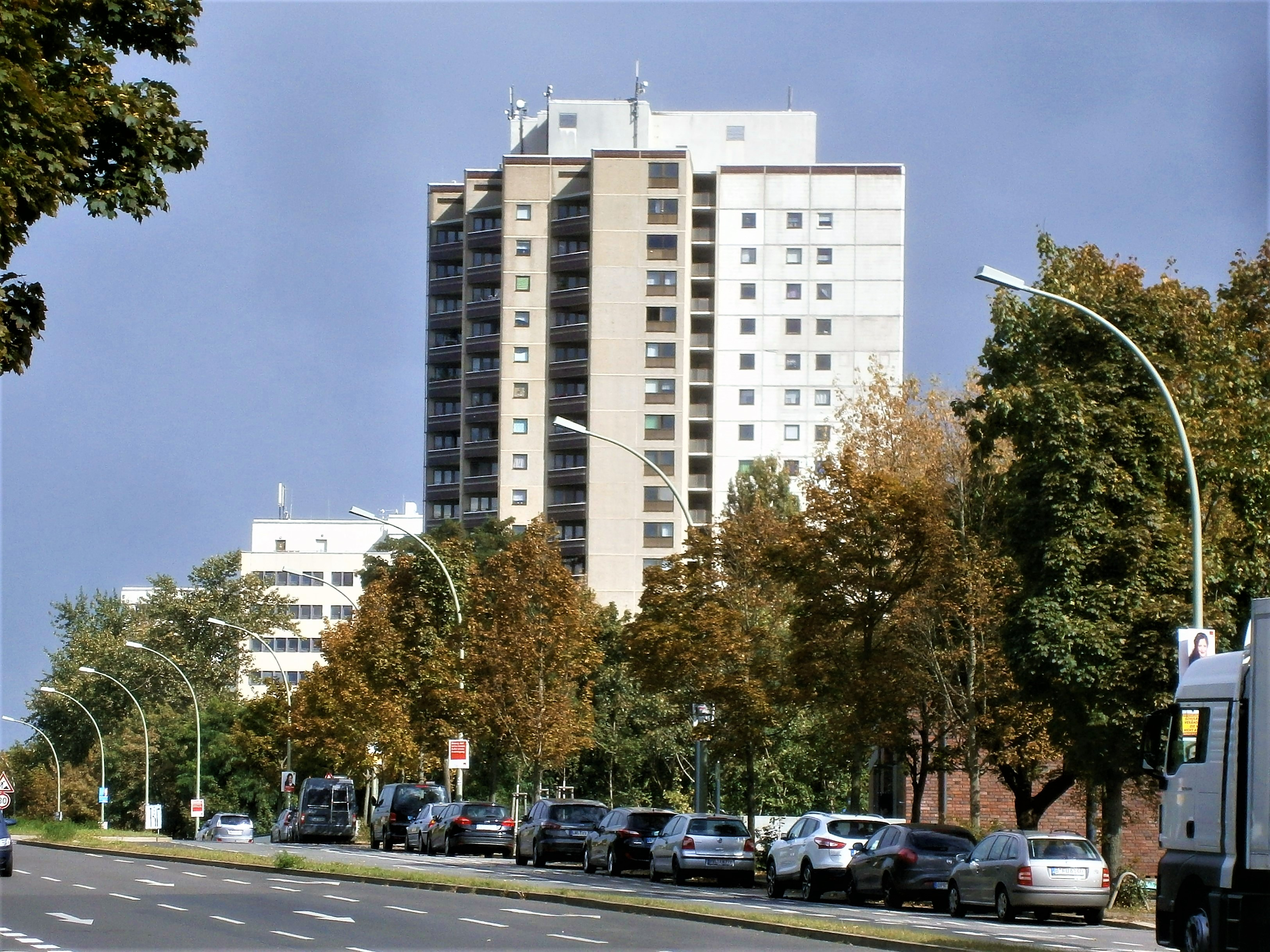 Die Kniprodestraße ist ein Verkehrszug im Berliner Bezirk Pankow, Ortsteil Prenzlauer Berg mit Grundstückszählung in Hufeisen. Bild: Das Wohnhochhaus Storkower Straße 108 an der SO-Ecke Kreuzung Kniprodestraße von Südwesten her.